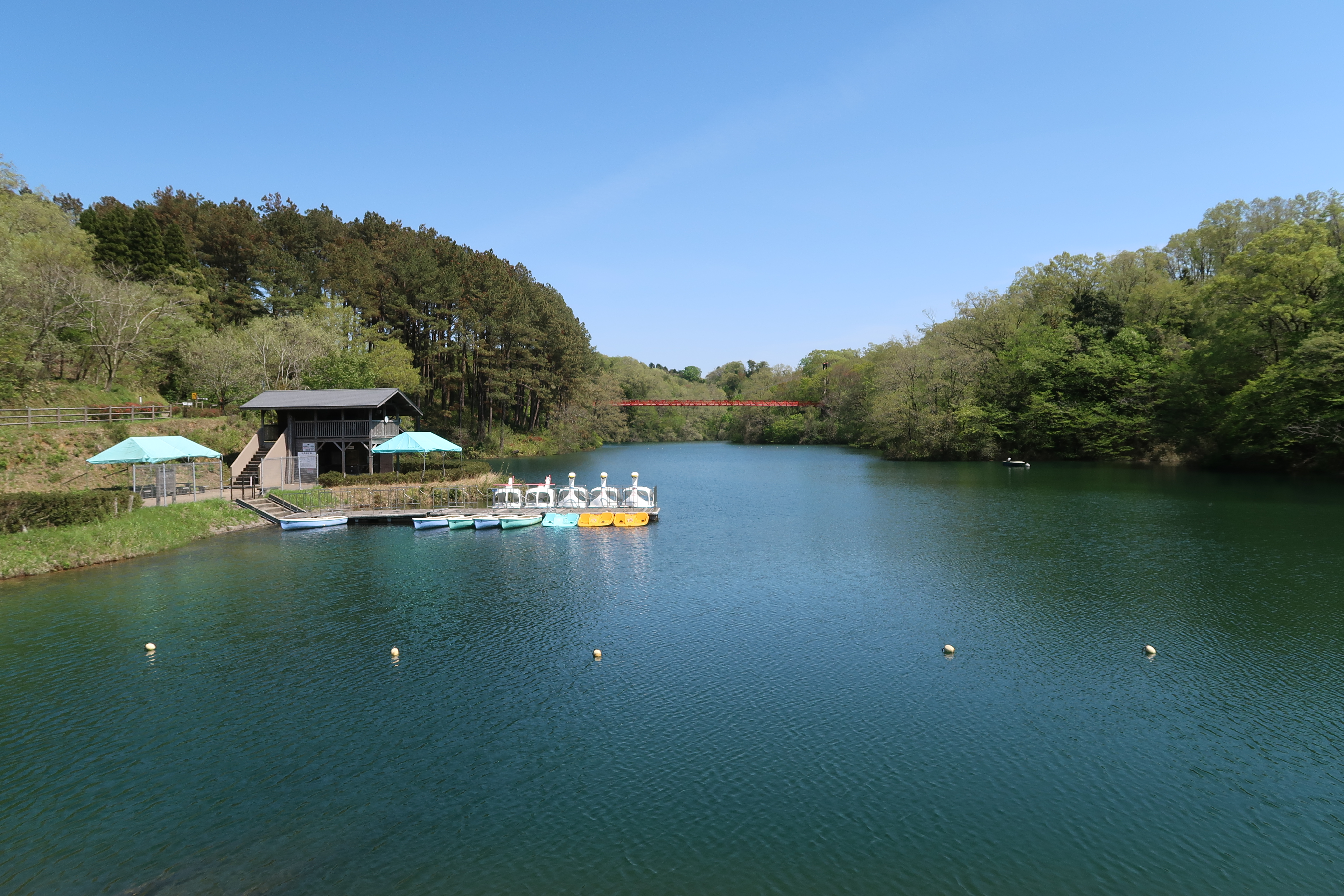 石川県森林公園の加茂池